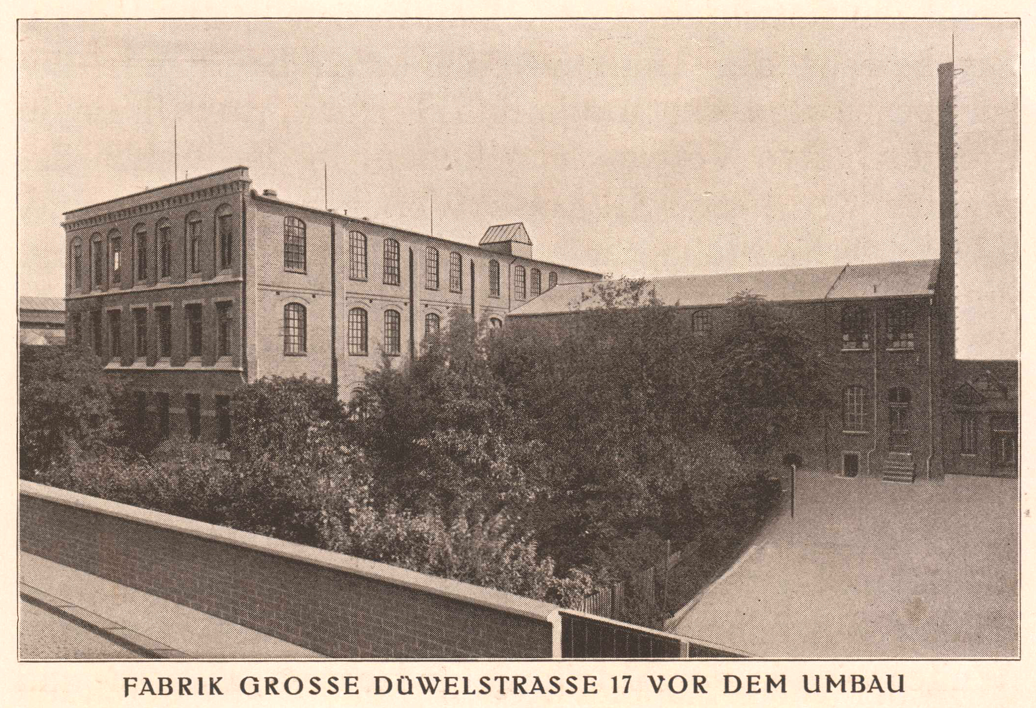 Ausschnitt aus der Jubiläumsschrift Fünfzig Jahre C. Louis Weber, des Kaiserlich Königlichen Hoflieferanten für Pelze mit Hauptsitz in Hannover, Große Packhofstraße 30 ...